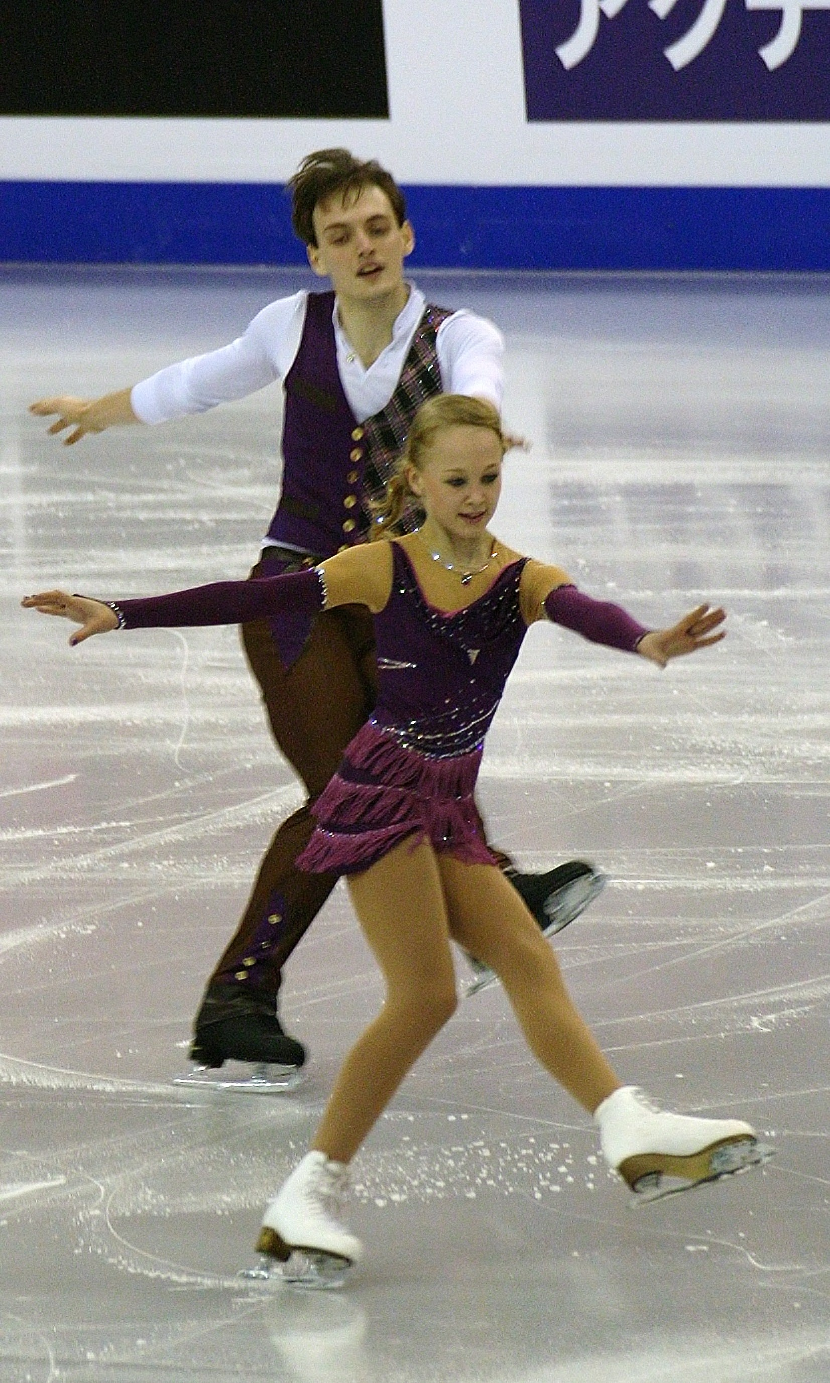 Анастасия Полуянова и Степан Коротков (Россия) на финале Гран-при по фигурному катанию среди юниоров 2015-2016.